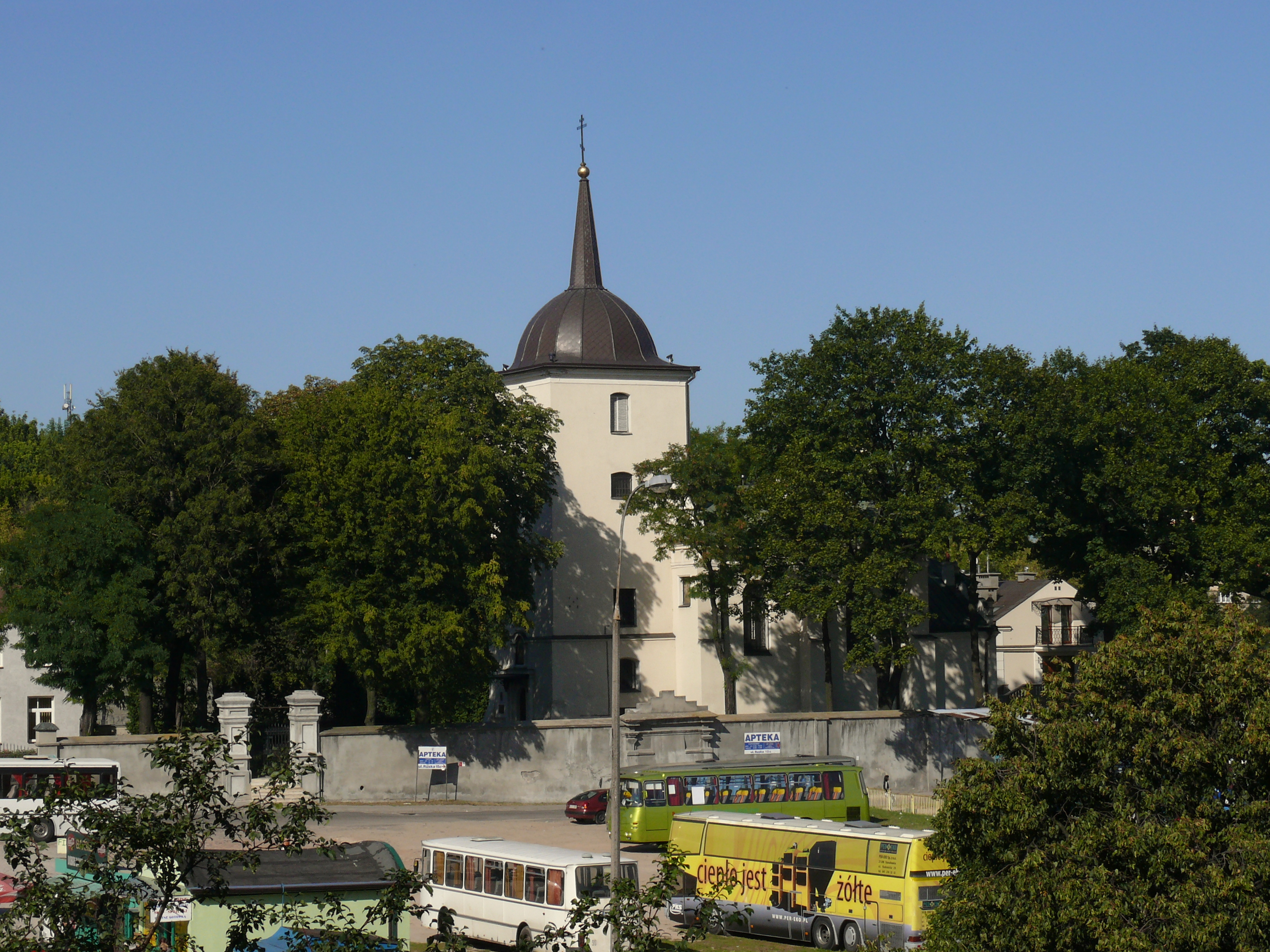 cerkiew parafialna przy ul. Ruskiej w Lublinie